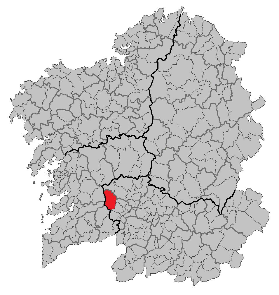 Mapa coa localización do concello de Avión.